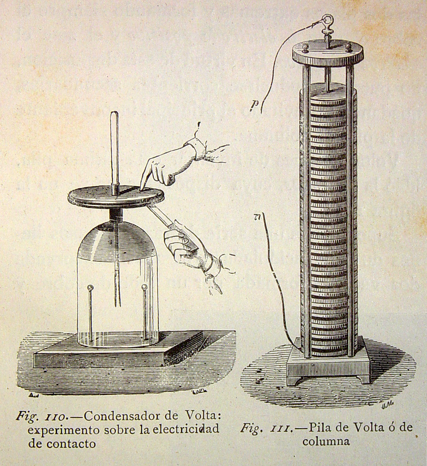 Ilustraciones de la obra : El mundo físico : gravedad, gravitación, luz, calor, electricidad, magnetismo, etc. / A. Guillemin. - Barcelona Montaner y Simón, 1882